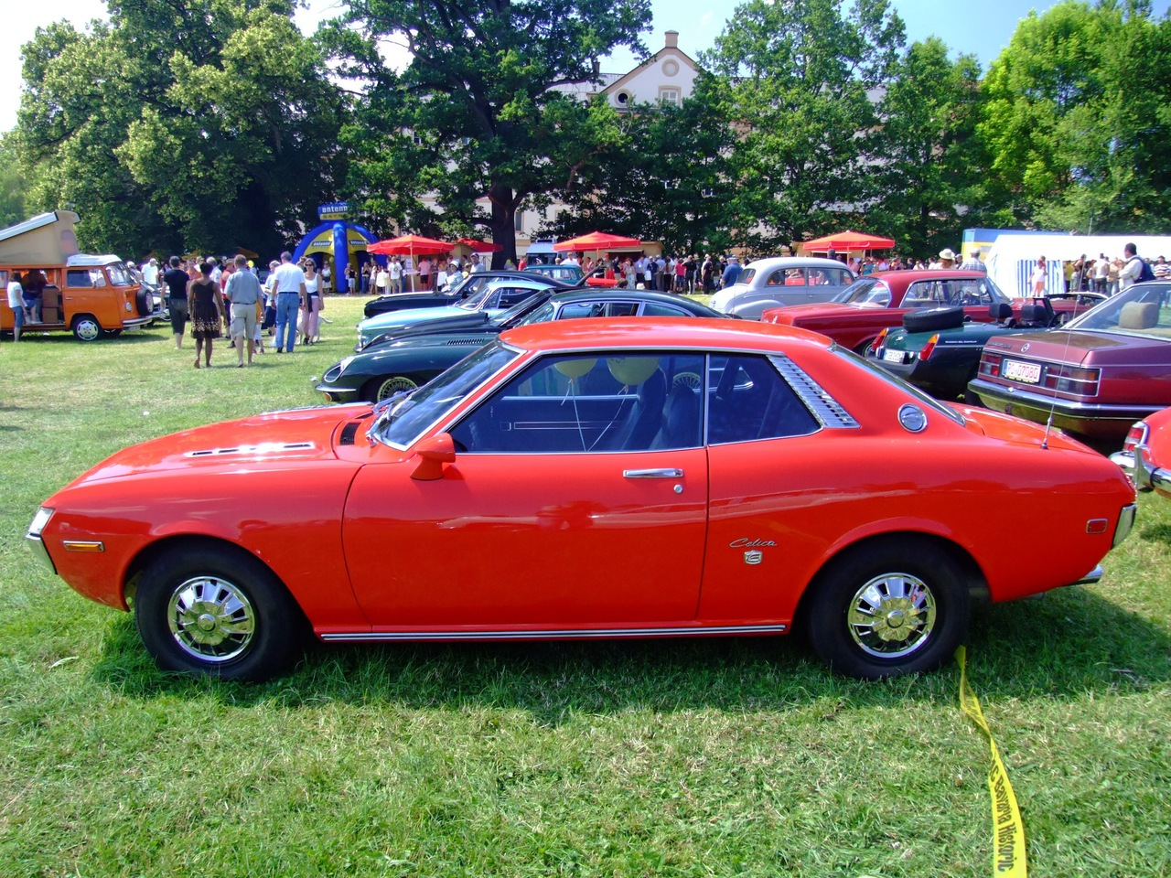 Quelle: selbst fotografiert, 06/2007 Fotograf: Späth Chr.